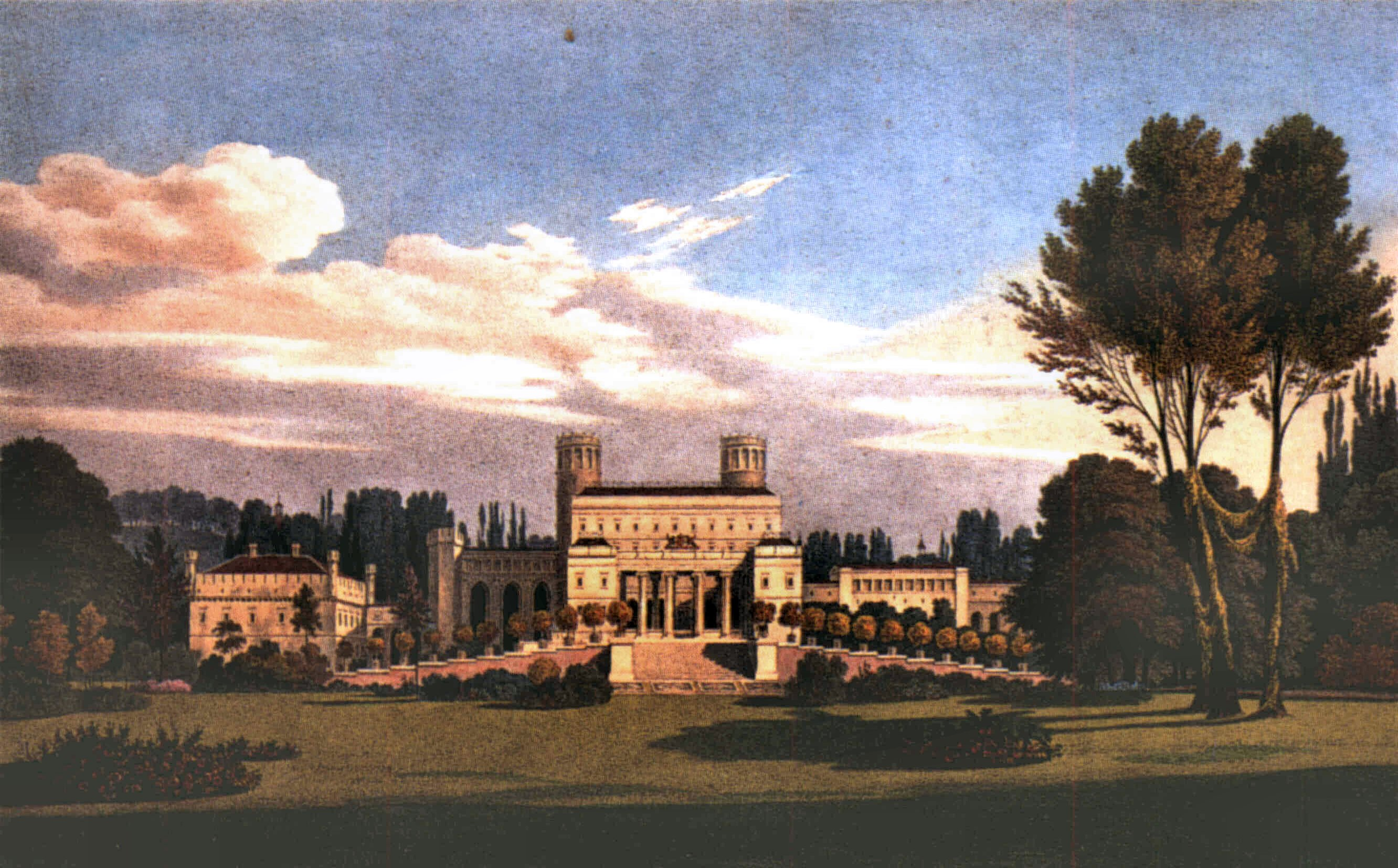 Neues Schloss in Muskau: Schloss und Rampe vom bowling green aus gesehen. Die Lithographie aus dem Jahr 1834 enthält bereits von Schinkel entworfenen Umbauten, die Pückler wegen Geldmangels nicht realisieren konnte.